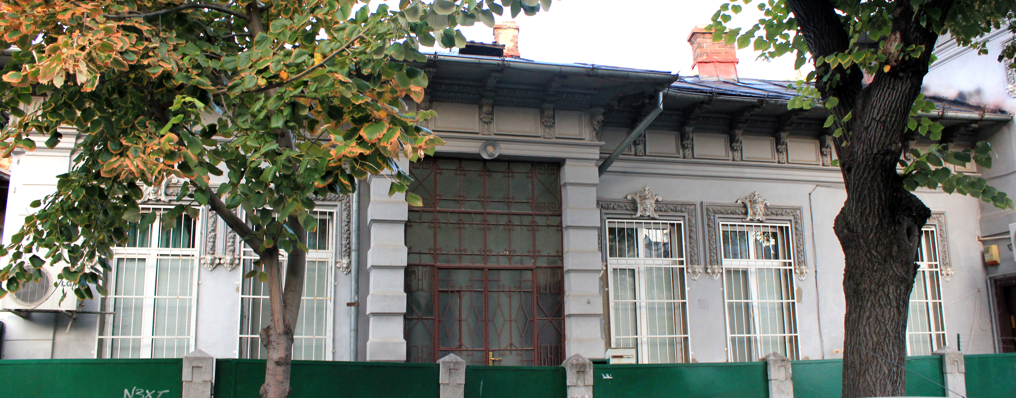 Casa Burghelea 15